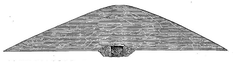 Coupe du tumulus de Kerhué Bras en Plonéour-Lanvern (Finistère) par Paul du Chatellier